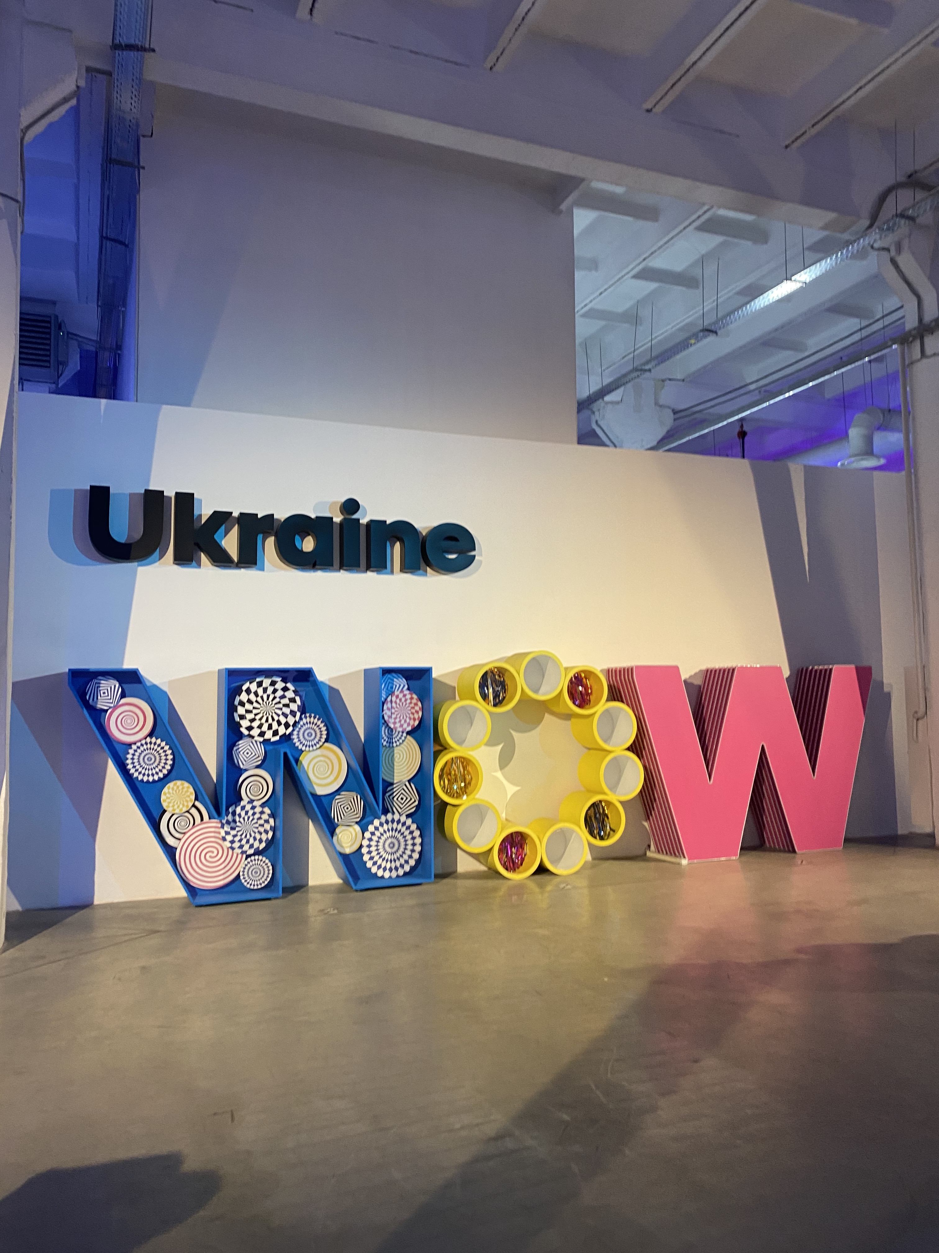 Ukraine WOW